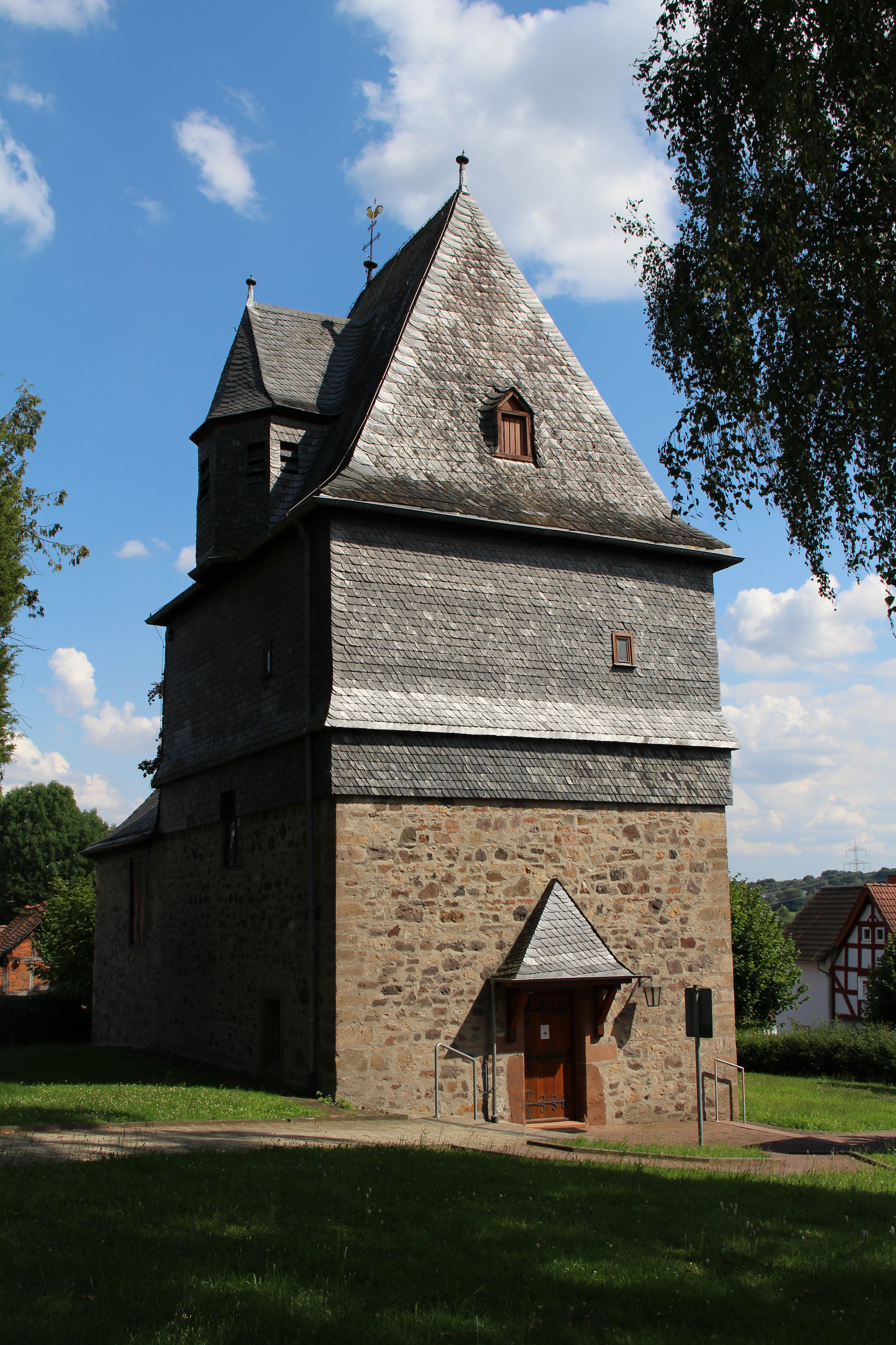 Kirche